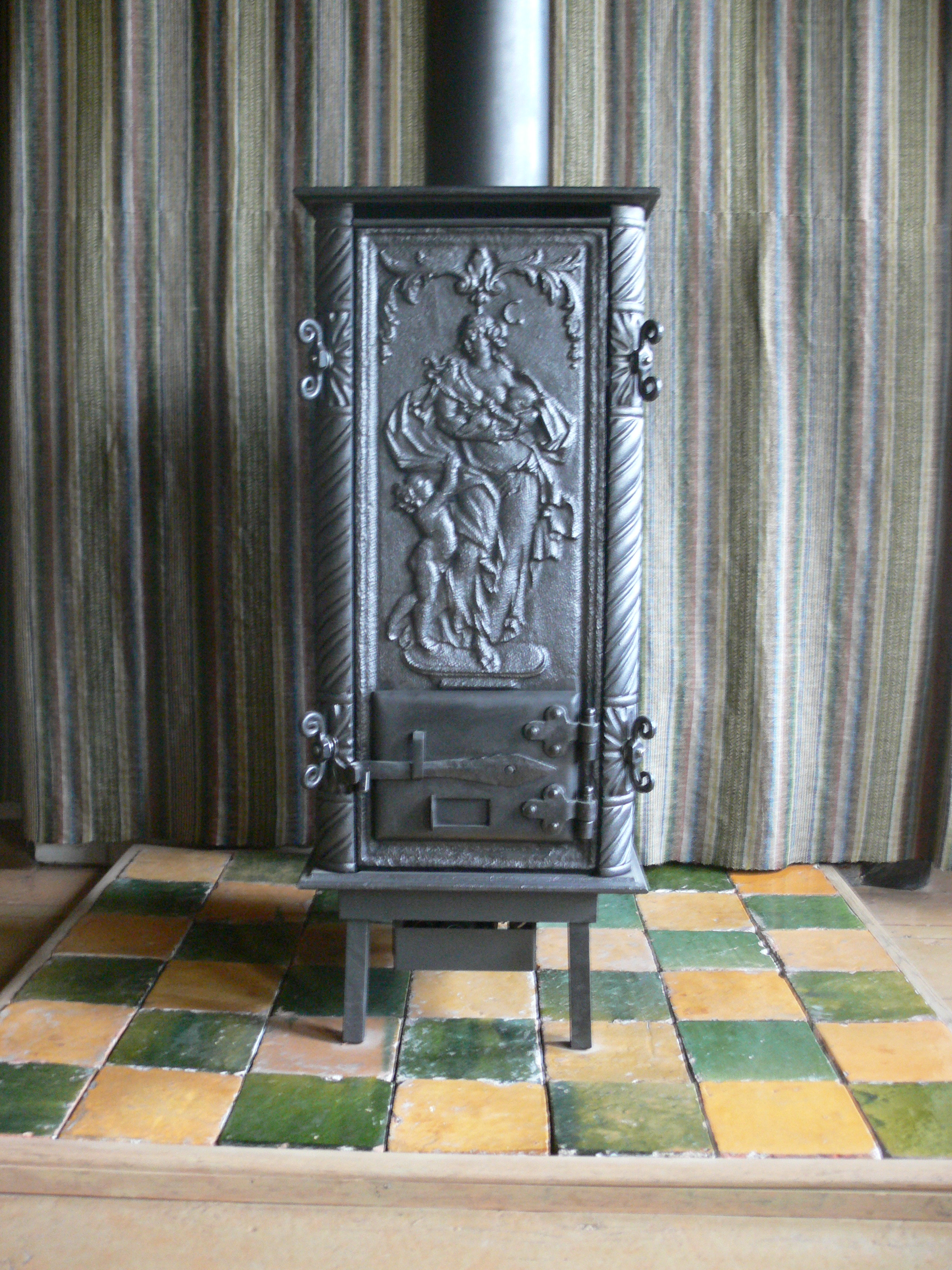 Amsterdam - Museum Ons' Lieve Heer op Solder